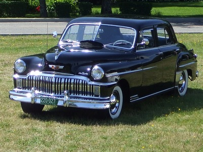 Français cadien: Superbe DeSoto 1949, propriétaire S.Dubé de Rimouski. Cette Voiture a gagnés des prix lors d'expositions...